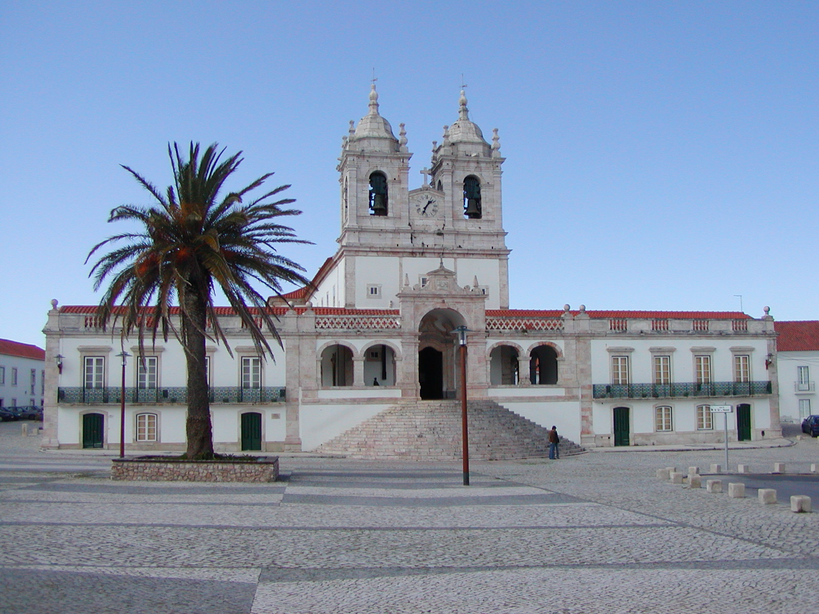 Kirche in Nazaré (Oberstadt)